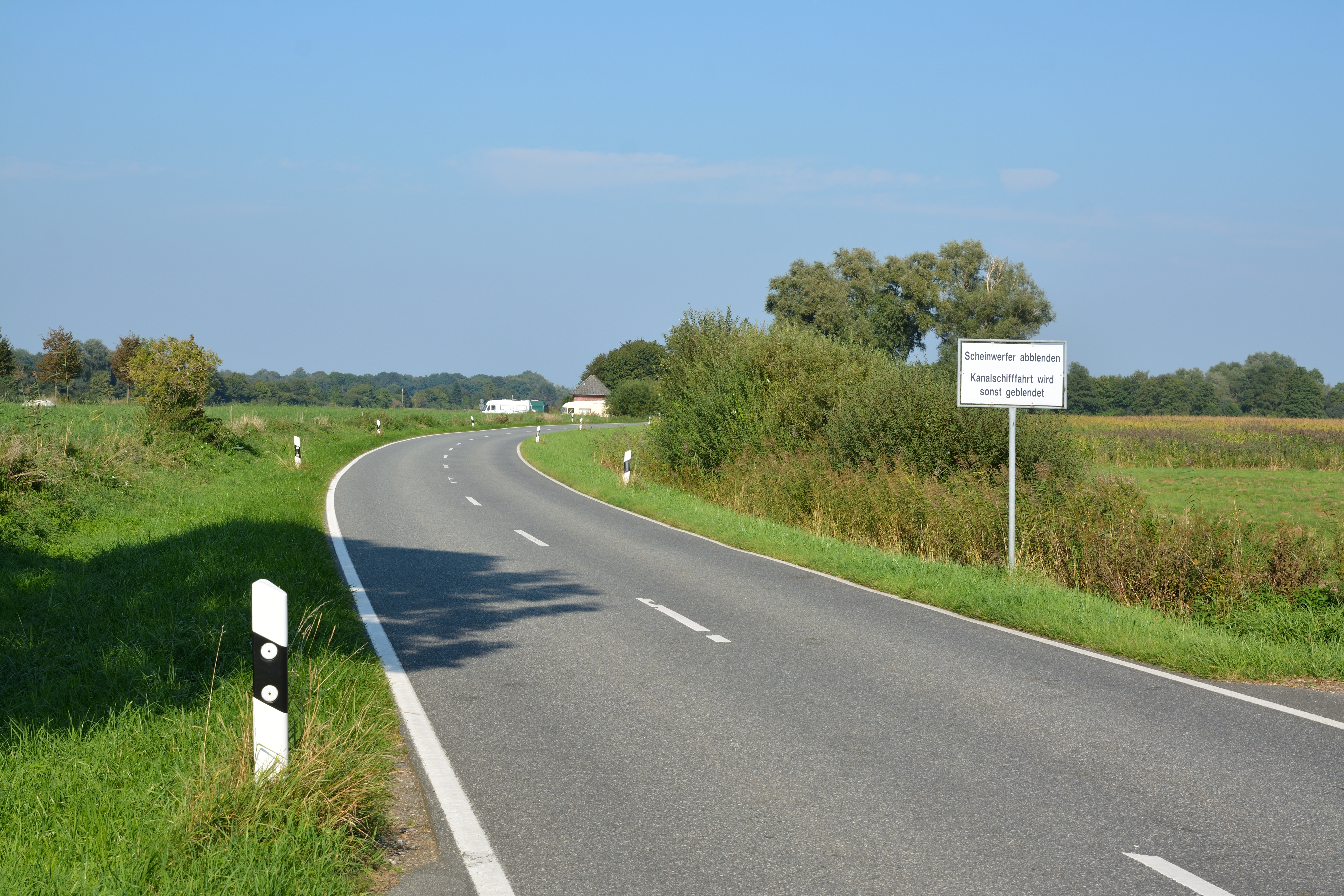 Bitte um die Vermeidung von Fernlicht an einer Strasse parallel zum Nord-Ostsee-Kanal.